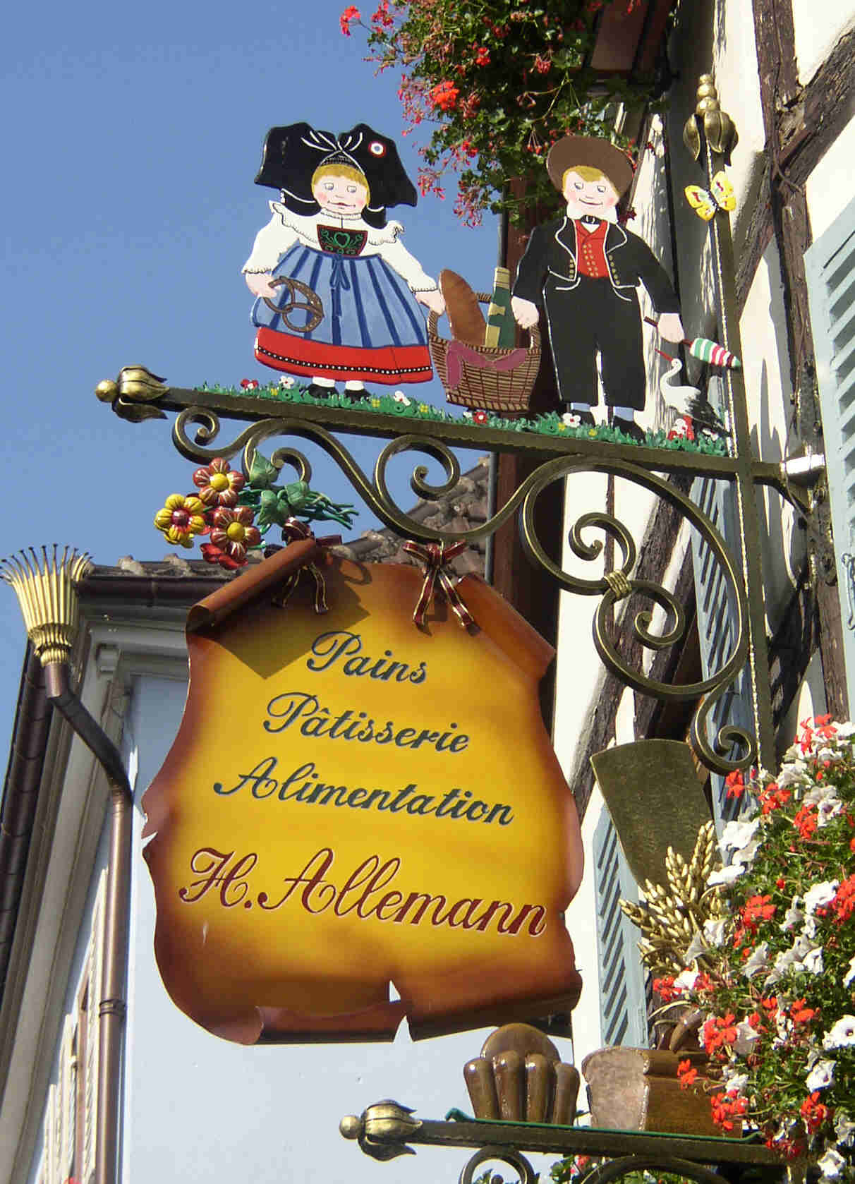 Foto vume Schild bime Beck im Elsass D Schlupfkappe un dr Nochnamme sin no elsässisch, alles ander franzesisch - drifft des Bild d Realität oder ischs nonit so wit?.